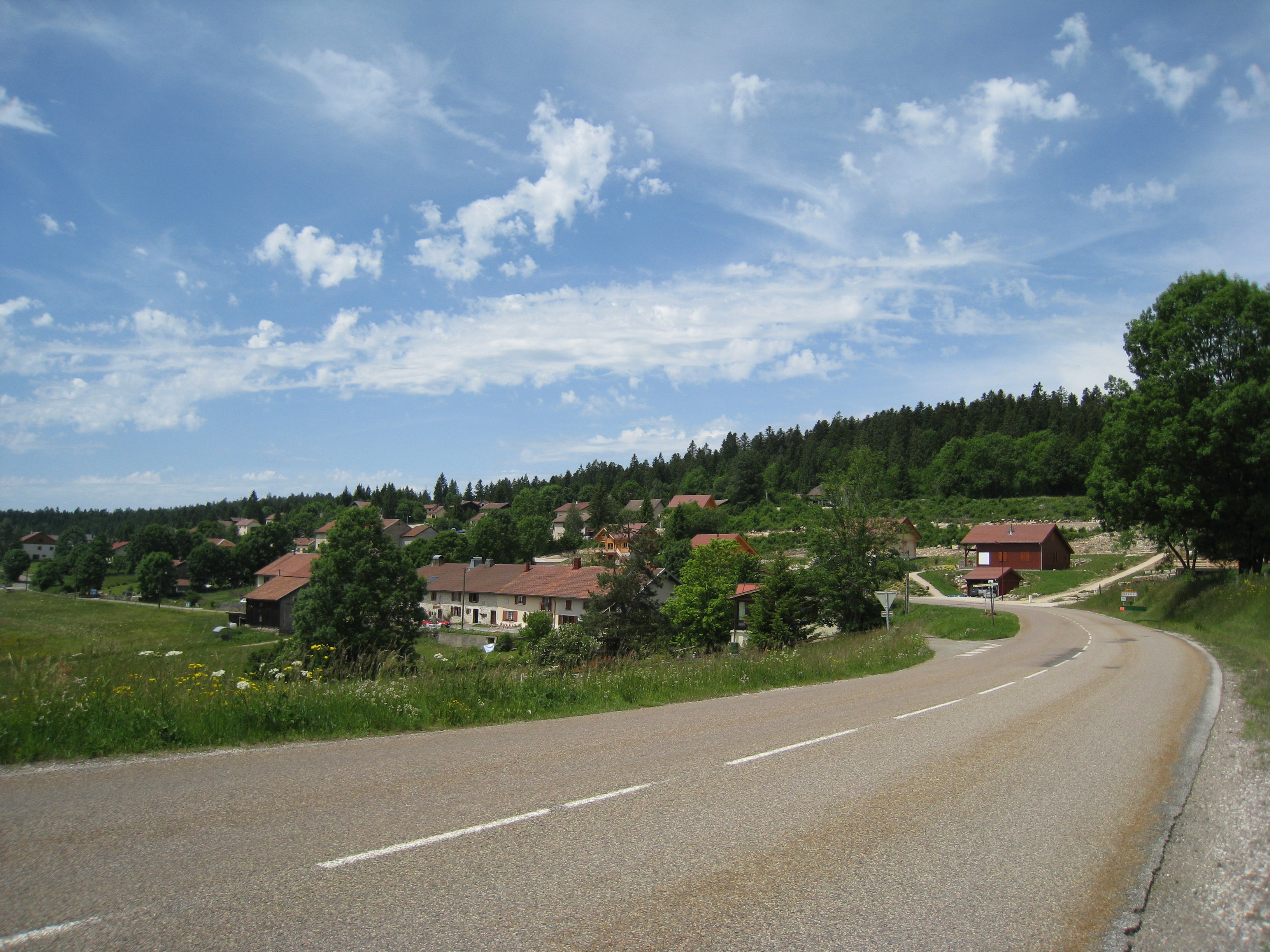 Vue d'ensemble de Prénovel, Jura, France